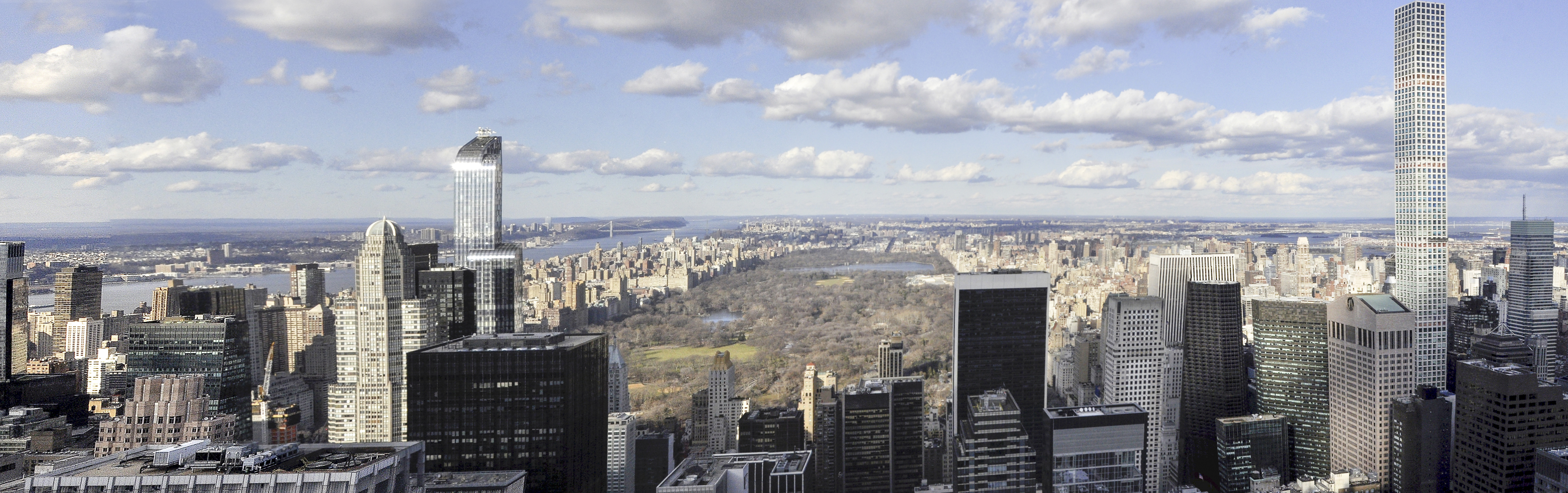 Top of the Rock, noordelijke zijde met Central Park - New York City